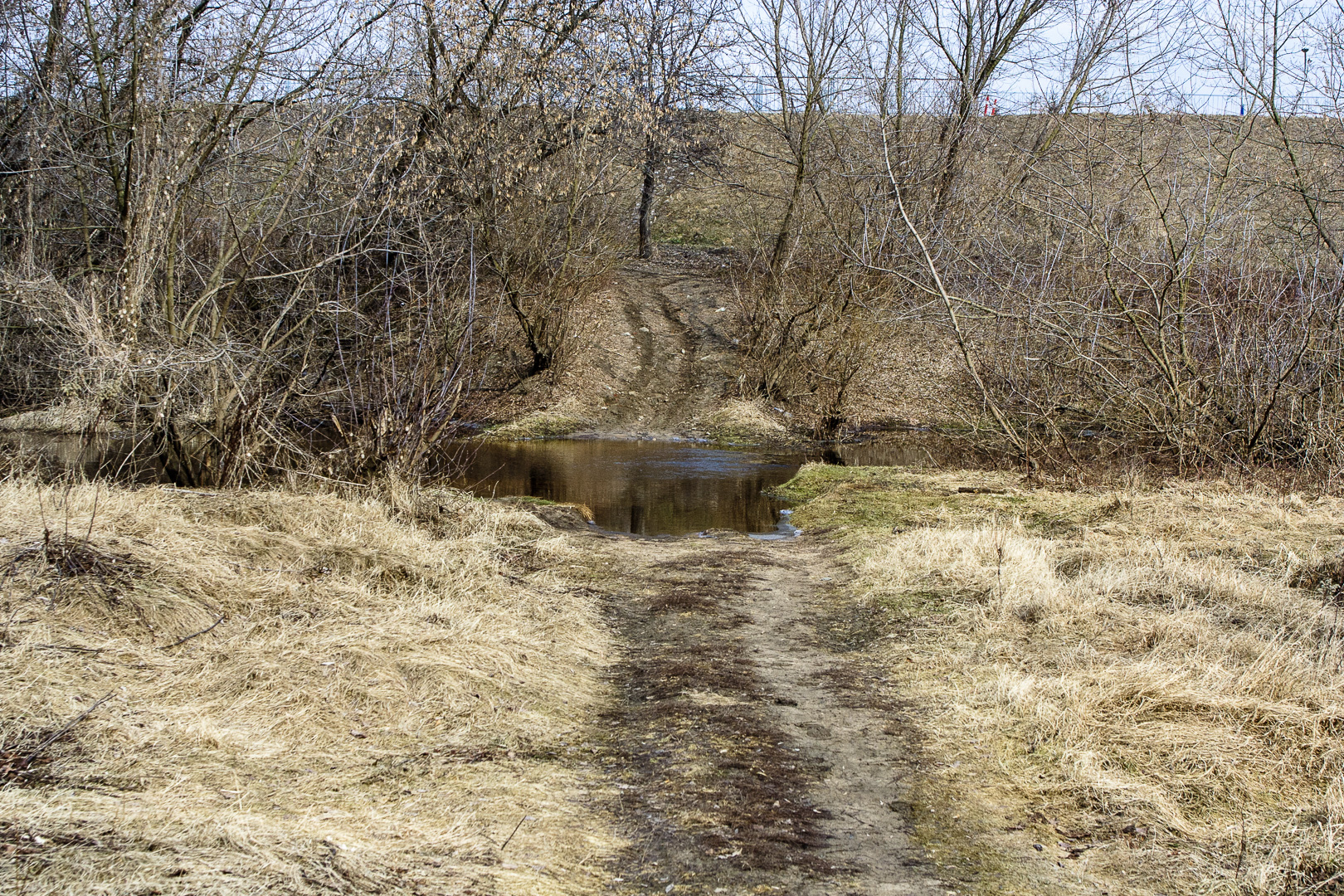 Widok z Kępy Wieloryb wzdłuż polnej drogi w kierunku Starej Wisły i przeciwpowodziowego wału Miedzeszyńskiego na przedwiośniu. This is a photography of Natura 2000 protected area with ID PLB140004